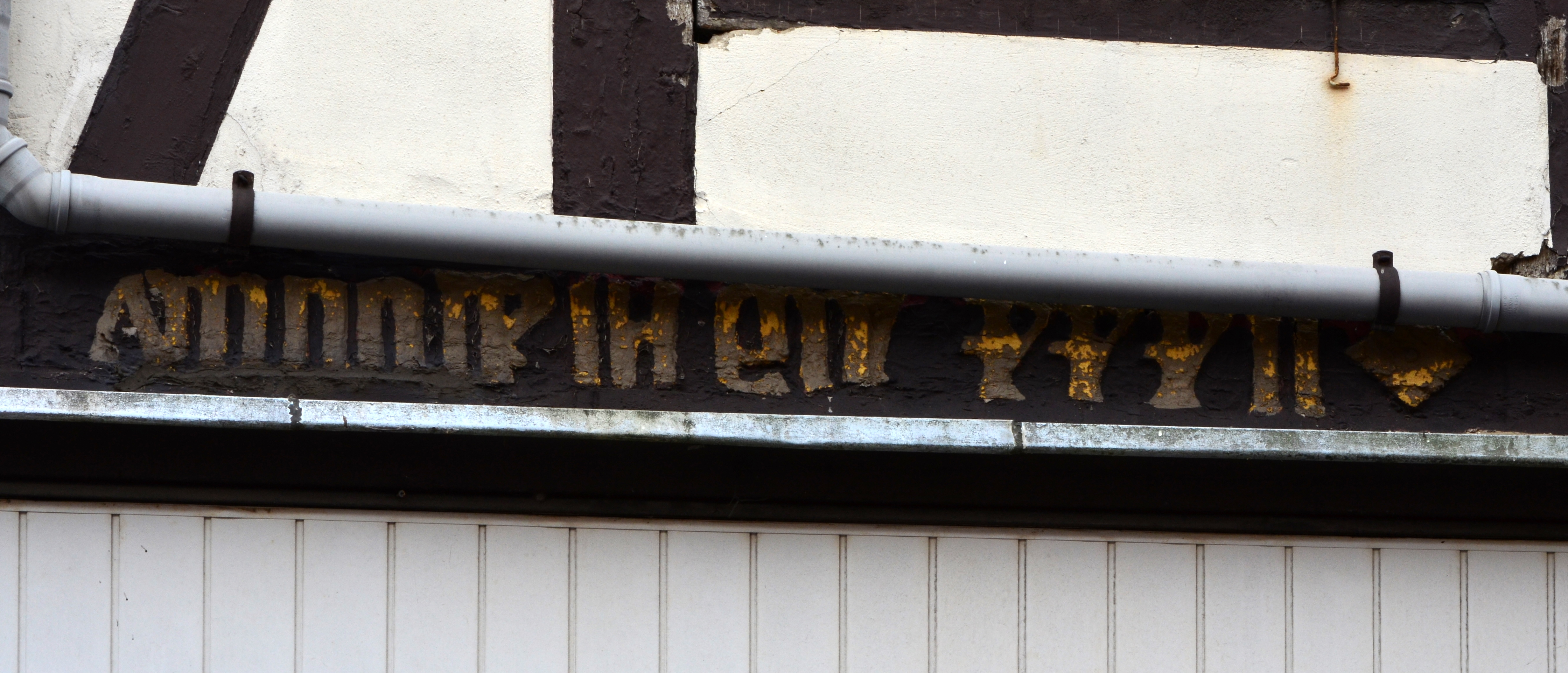 Braunschweig, Ackerhof: Ackerhof 2, fehlerhaft nachgemalte Jahresangabe „Anno d[omi]ni m cccc xxxii“ = 1432.